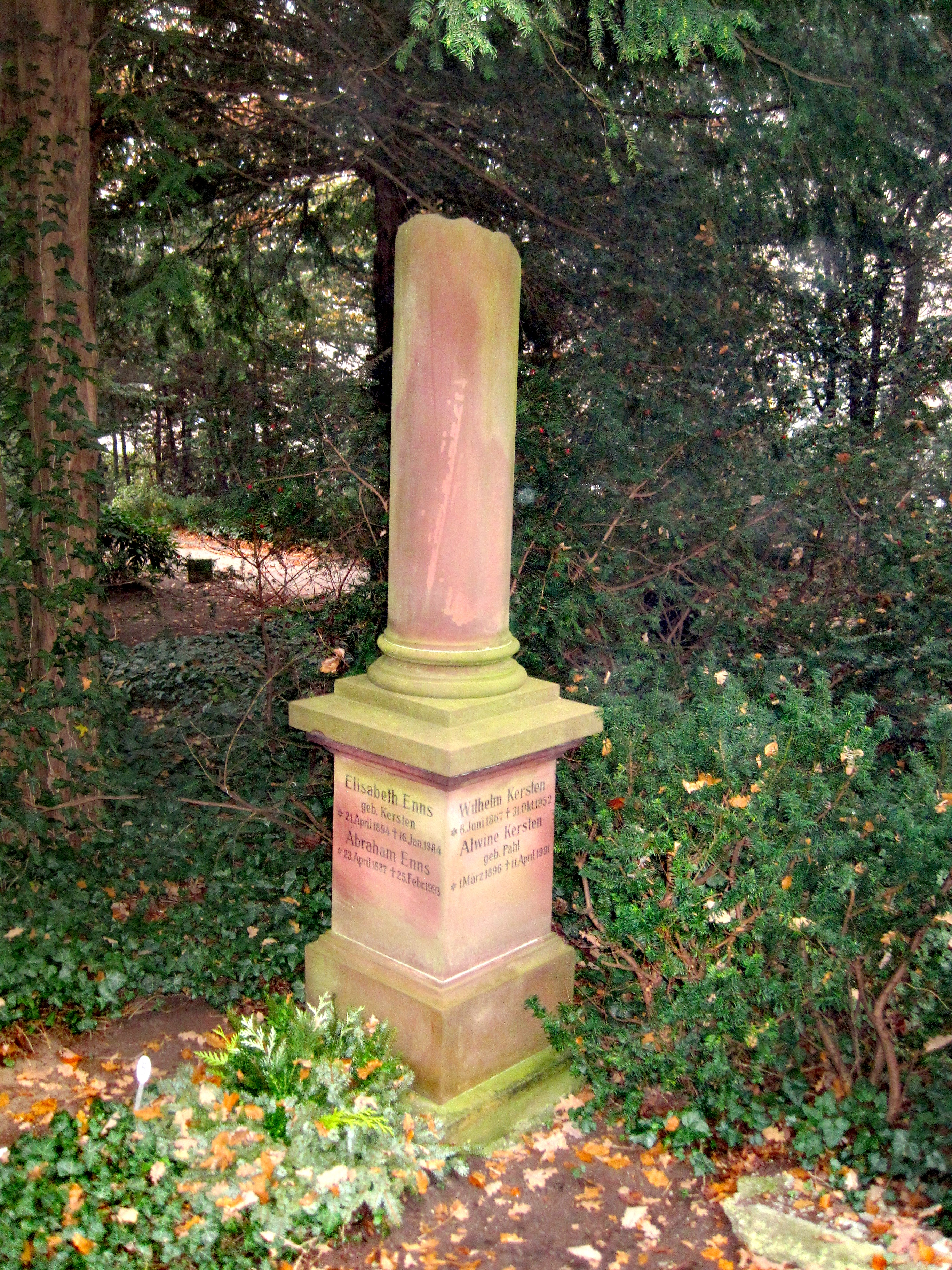 Grab Abram Enns, Lübeck, Burgtorfriedhof